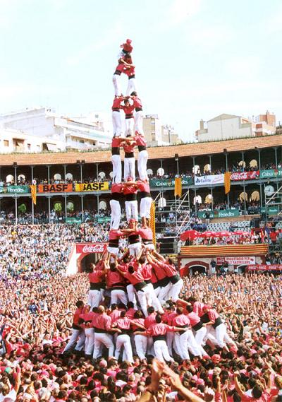 Primer i únic 3 de 10 amb folre i manilles carregat per la Colla Vella dels Xiquets de Valls fins l'actualitat. Fet el 8 d'octubre del 2000 a la plaça de Braus de Tarragona durant la segona ronda del XVIII Concurs de castells de Tarragona.